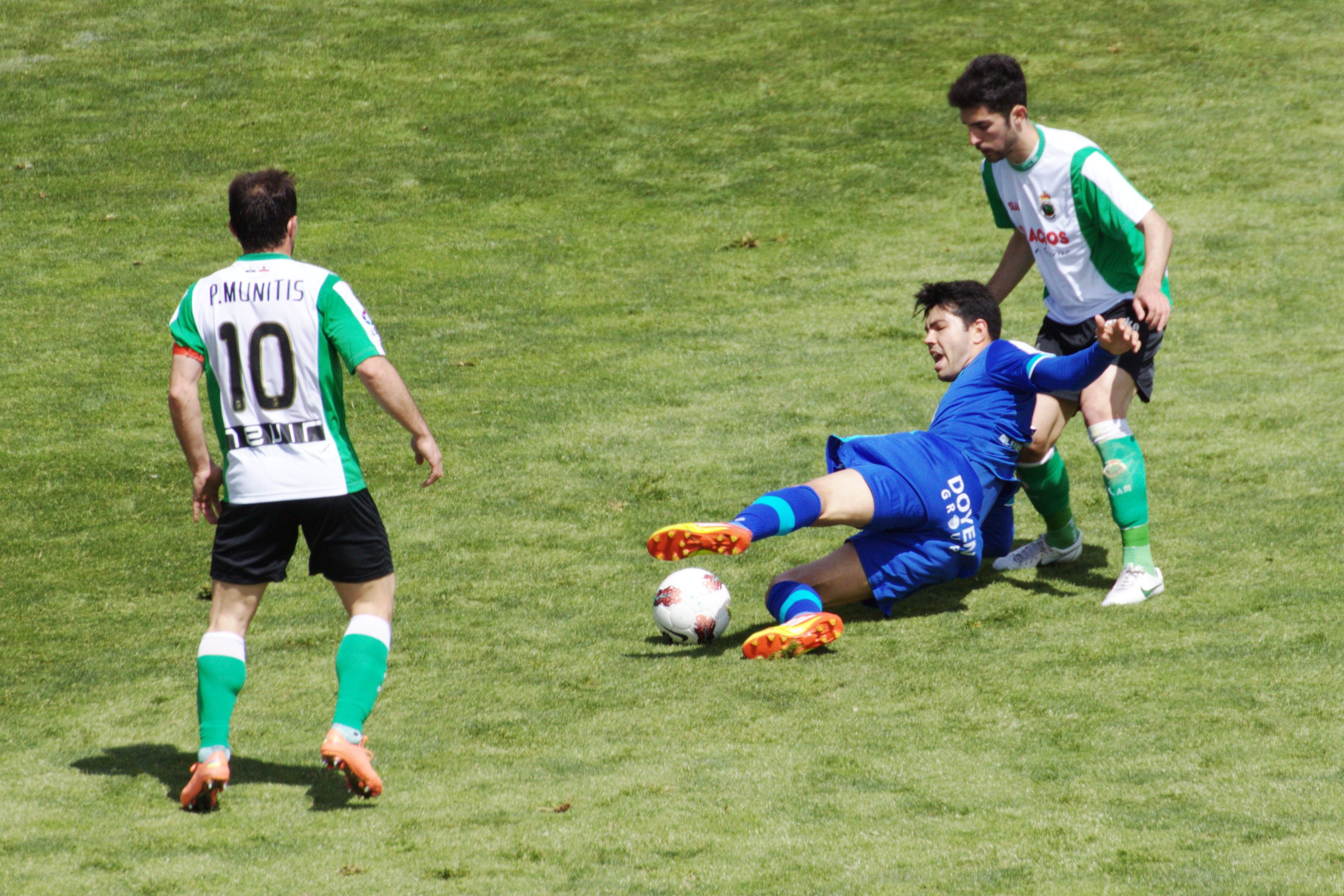 Nicolás Fedor, más conocido por su apodo Miku (Caracas, 19 de agosto de 1985), es un futbolista venezolano. Juega de delantero y su actual equipo es el Getafe CF.